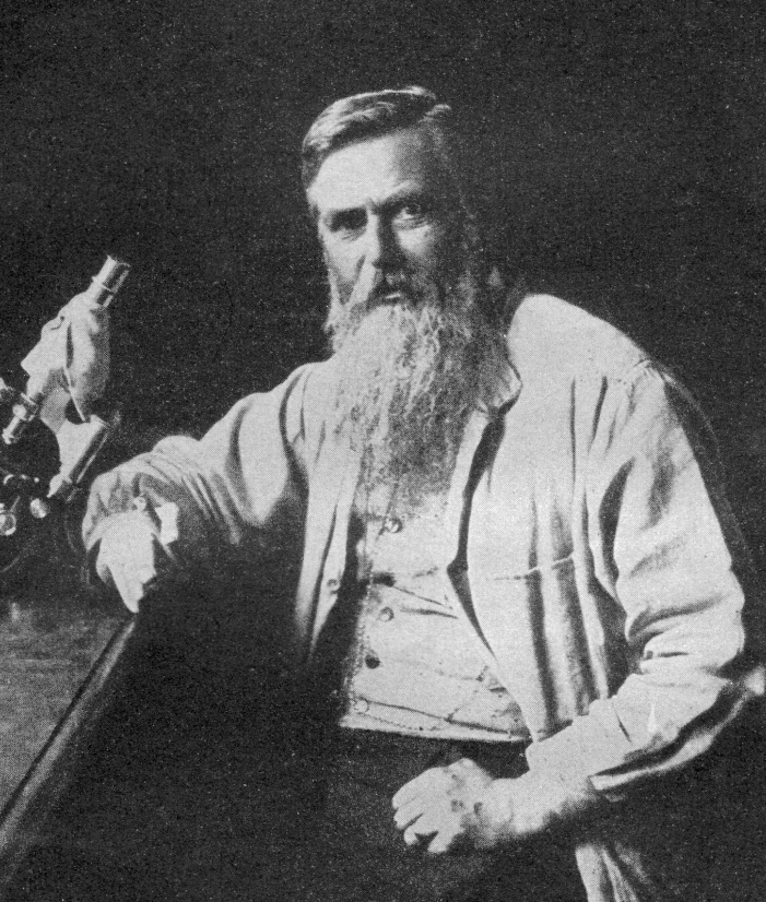 Summary Otto Bütschli um 1895 in Heidelberg Fotograf: H. Merton (verstorben)